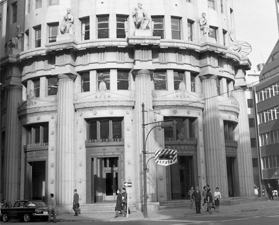 東証 60年代